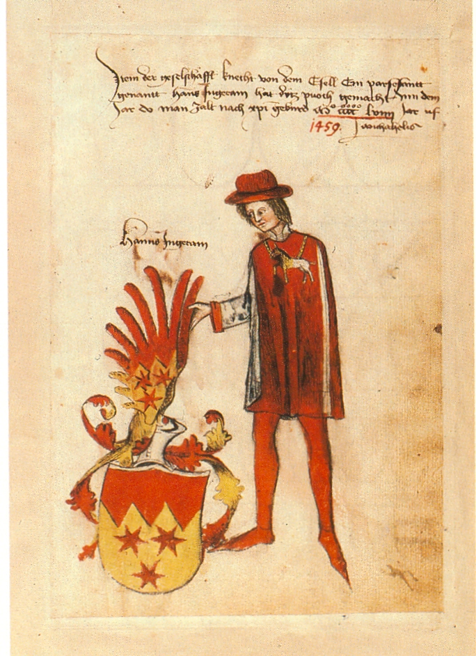 Ingeram-Codex der ehemaligen Bibliothek Cotta Item der geselschafft knecht von dem Esell Ein parsefantt / genantt Hans Ingeram hat dytz puoch gemacht Inn dem / Jar do man Zalt nach xpi(Christi) geburd Mcccclviiij Jar uf / Michahelis / 1459. / Hanns Ingeram.